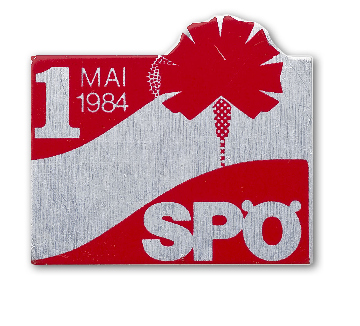 Foto: SPÖ/Thomas Lehmann --- Mehr zur Geschichte des 1. Mai auf --- Auf wird die österreichische Zeitgeschichte aus sozialdemokratischer Sicht beschrieben. Das Projekt setzt auf Partizipation und versteht sich als „Work in Progress“ - der gegenwärtig vorhandene Grundstock an Artikeln wird laufend aktualisiert und ausgebaut sowie um neue Themen ergänzt.